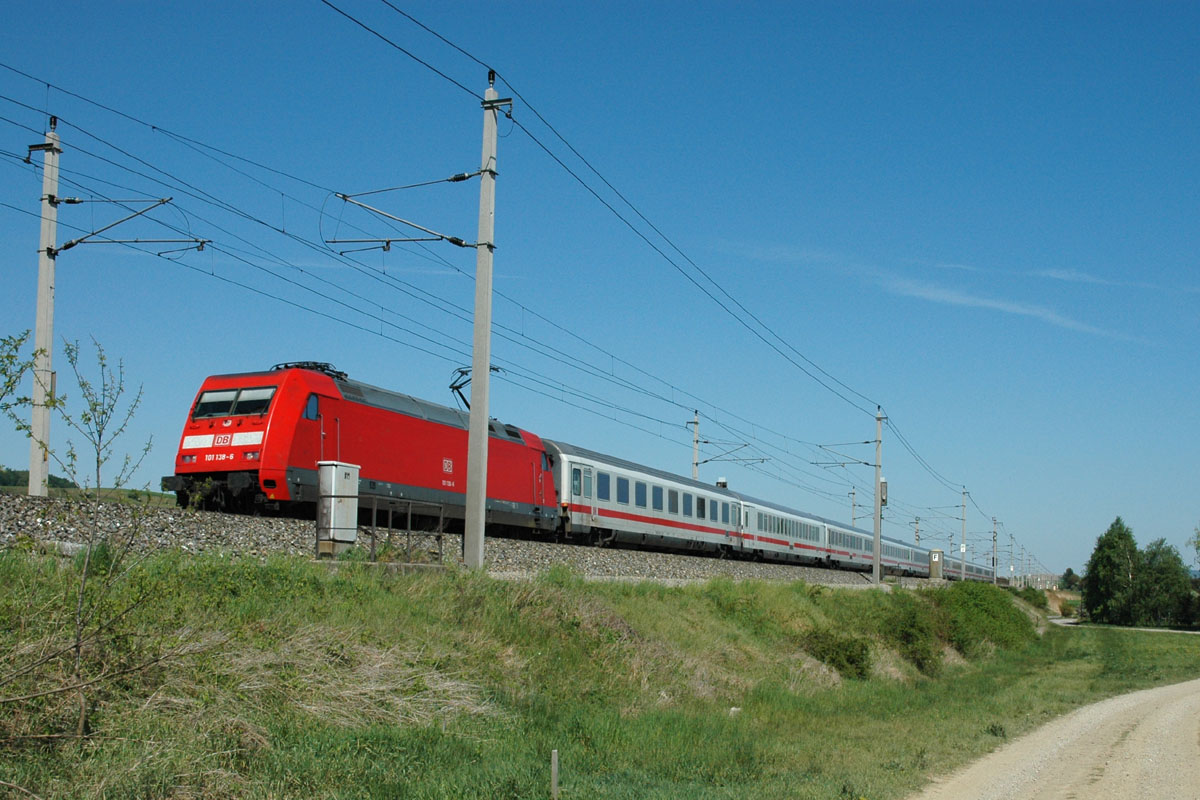 101 138 am 30. April 2007 bei Böheimkirchen